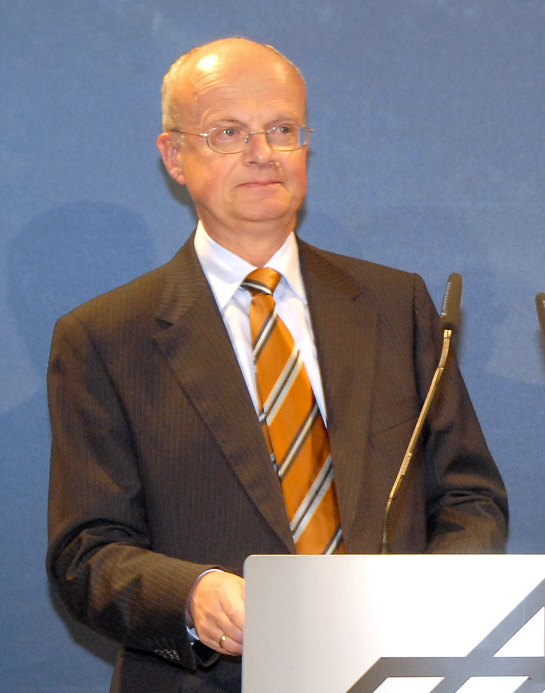 Prof. Dr. Peter Frankenberg, Ausschnitt aus File:JHV_Begruessung.jpg